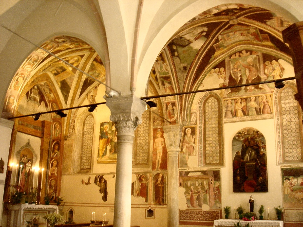 Serravalle di Vittorio Veneto (Treviso): interni di San Giovanni Battista con le cappelle con affreschi del Quattrocento, a sinistra la cappella Sanfiori, a destra la cappella Galletti con la pala (San Nicola, Sant'Ambrogio, un santo cardinale e due devoti), 1607 del Frigimelica